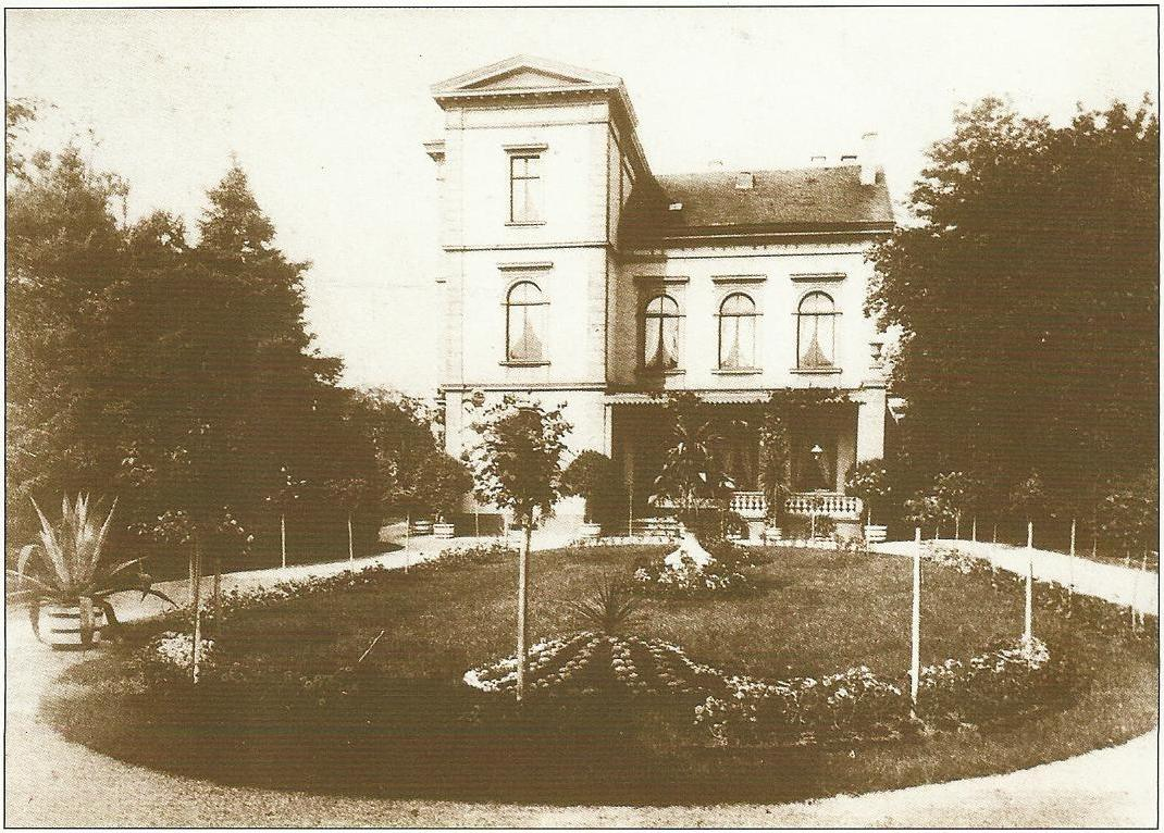 Luisenstraße 1 (Villa Modersohn/Obernitz), Honnef This is a photograph of an architectural monument. 51